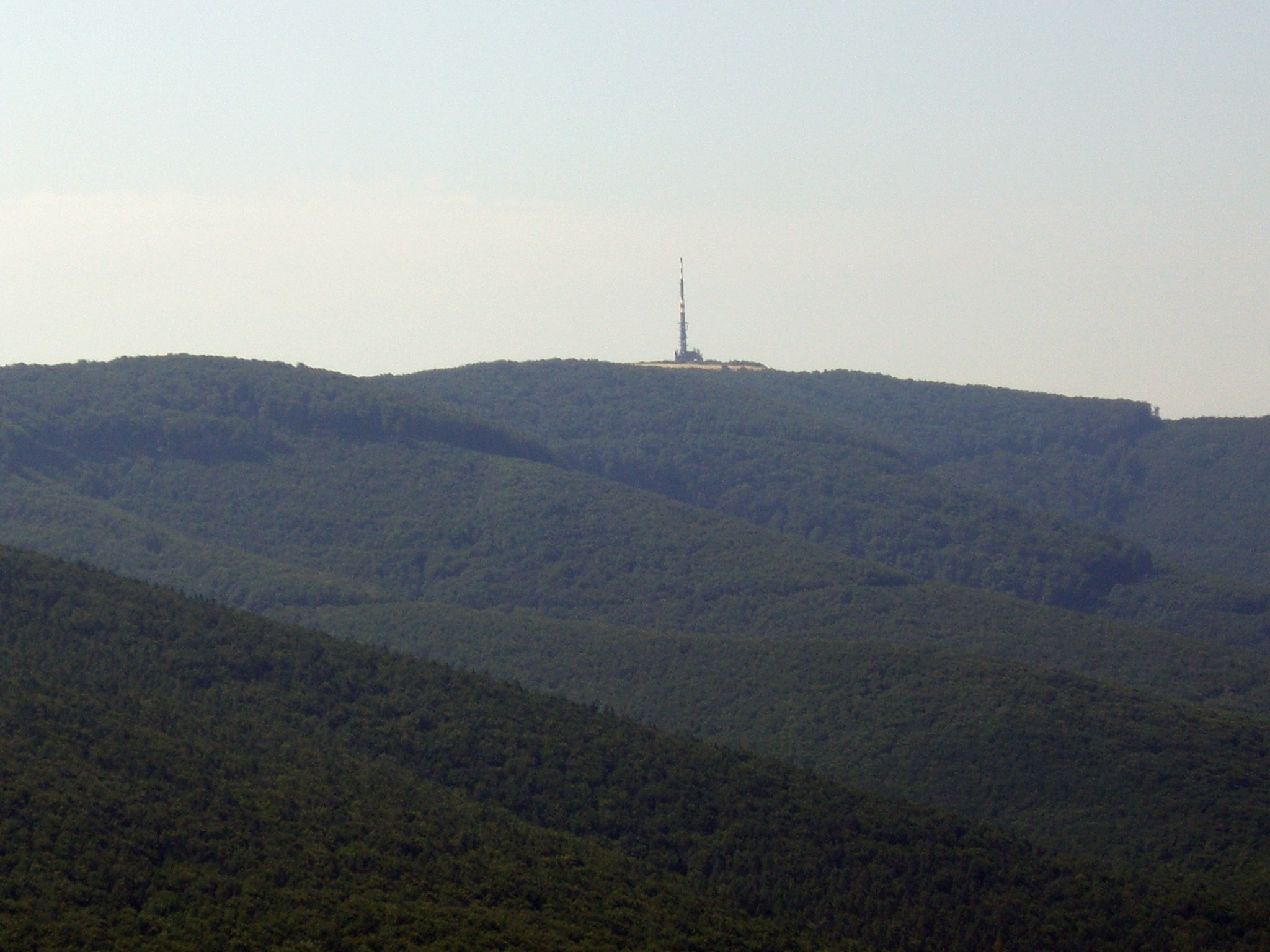 Velká Javorina